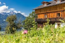 Fotografie Ederhof 2019